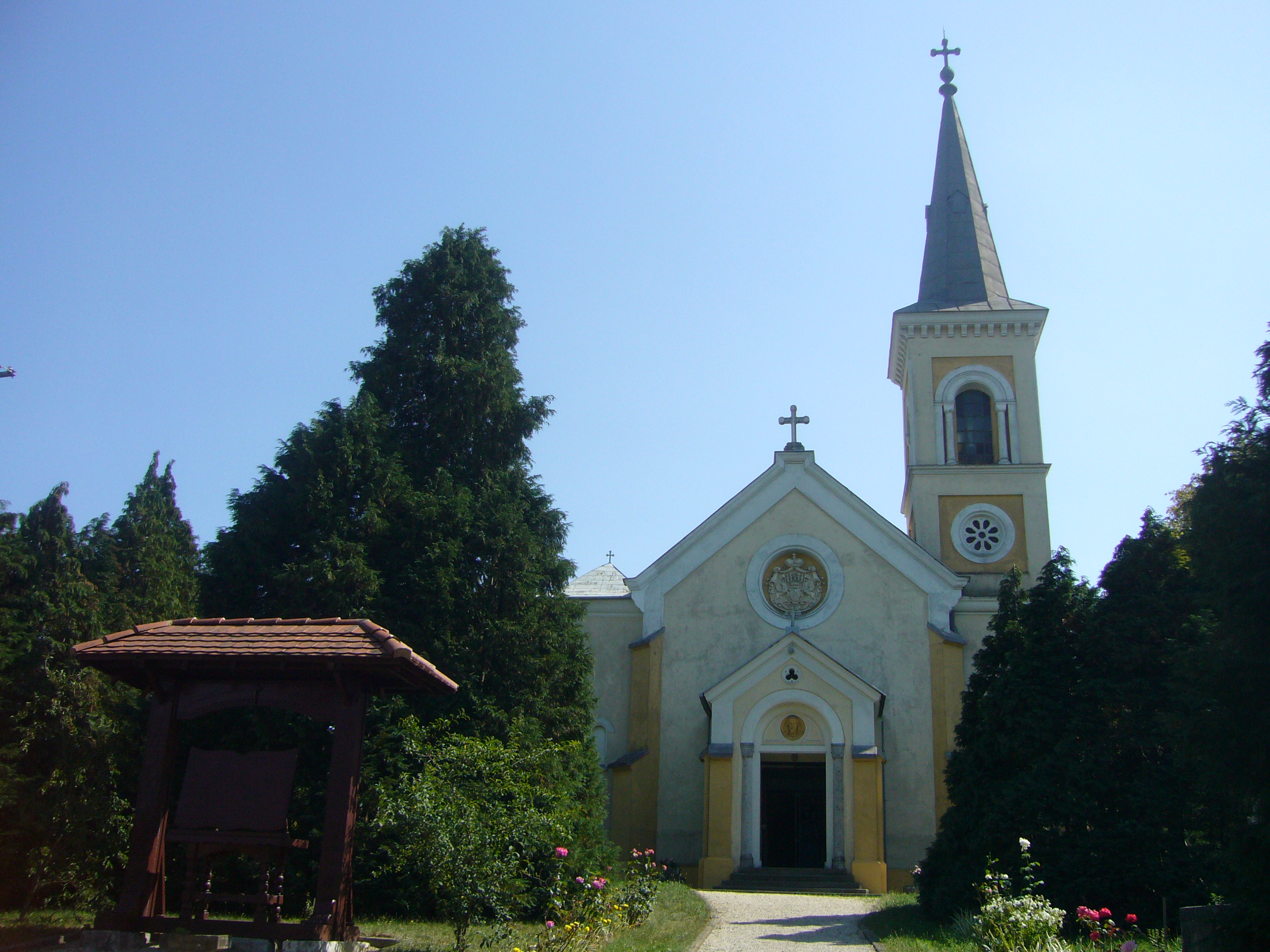 Nádasd